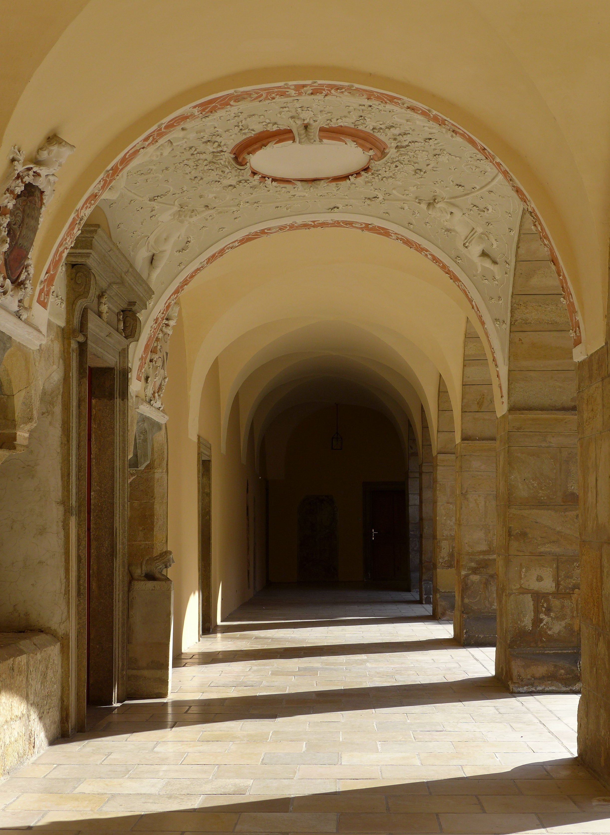 Abtei Seckau, Innerer Klosterhof, Kreuzgang 1